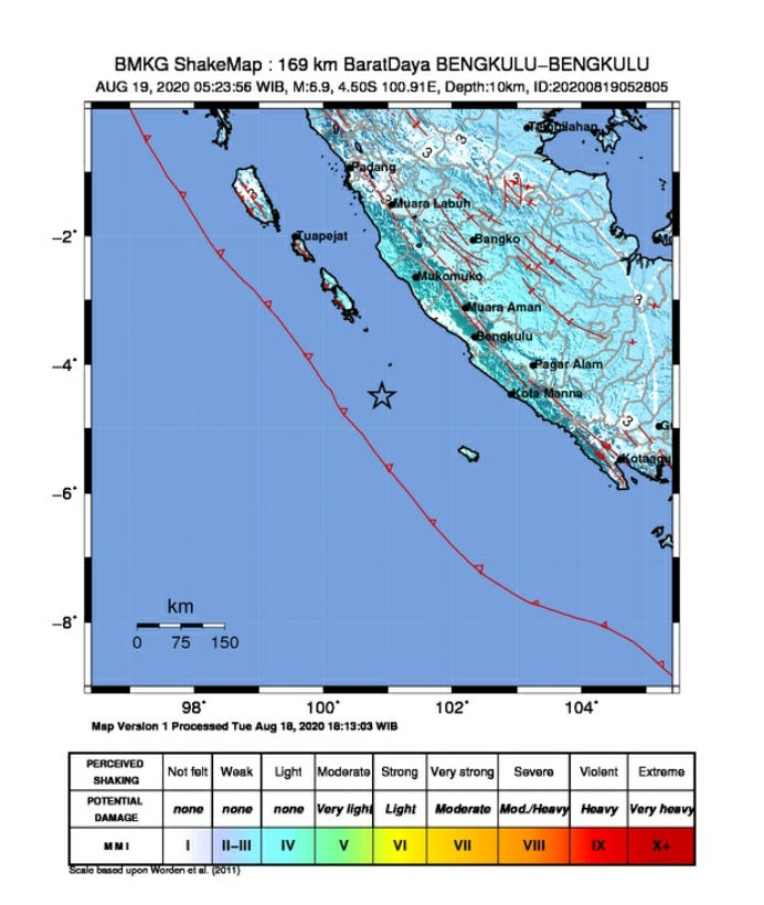 Peta guncangan gempa bumi pertama sebelum gempa kedua